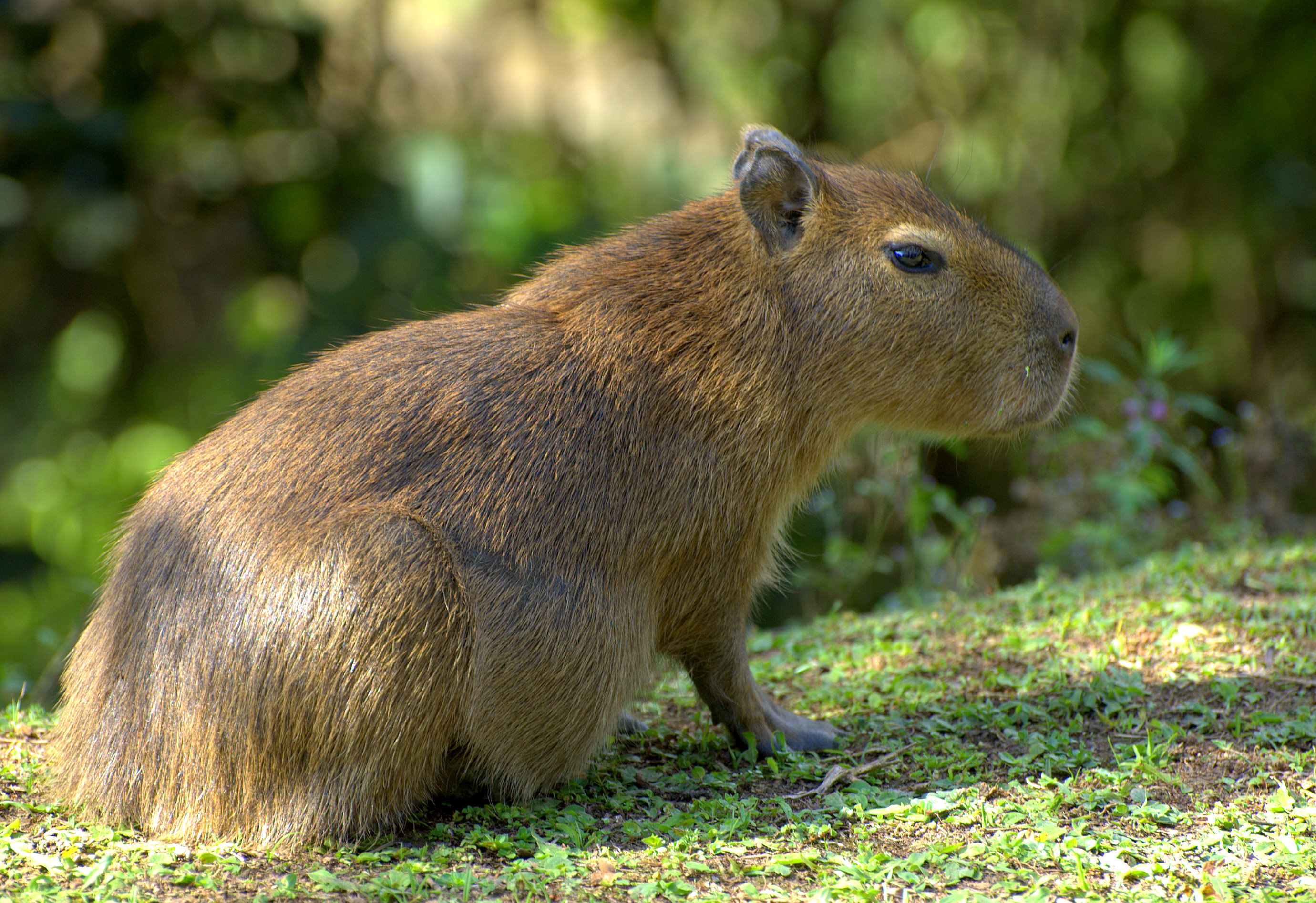 Horto Florestal de São Paulo ANIMAL EM ÁREA LIVRE DENTRO DO PARQUE